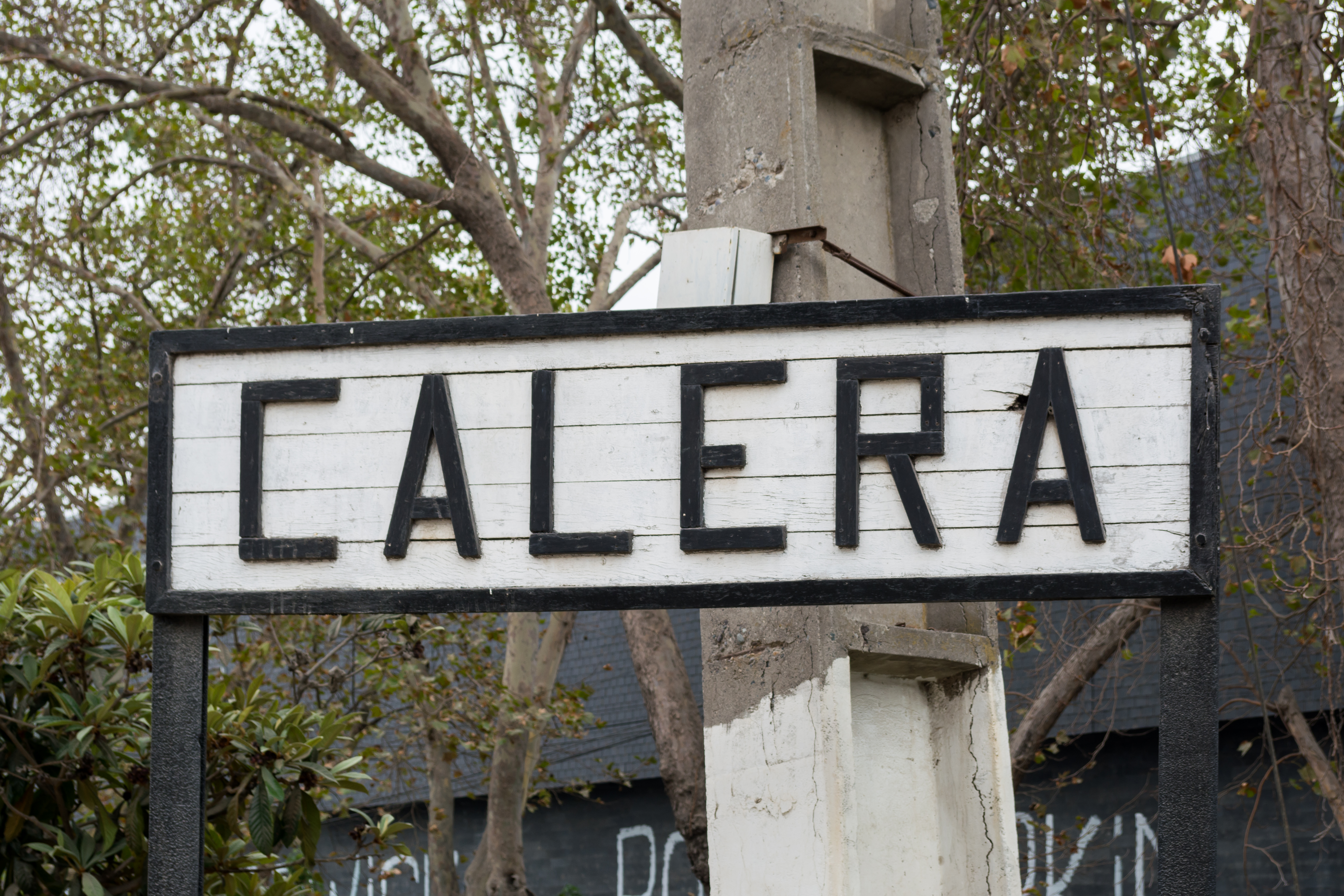 Estación Calera, La Calera, Región de Valparaíso, Chile